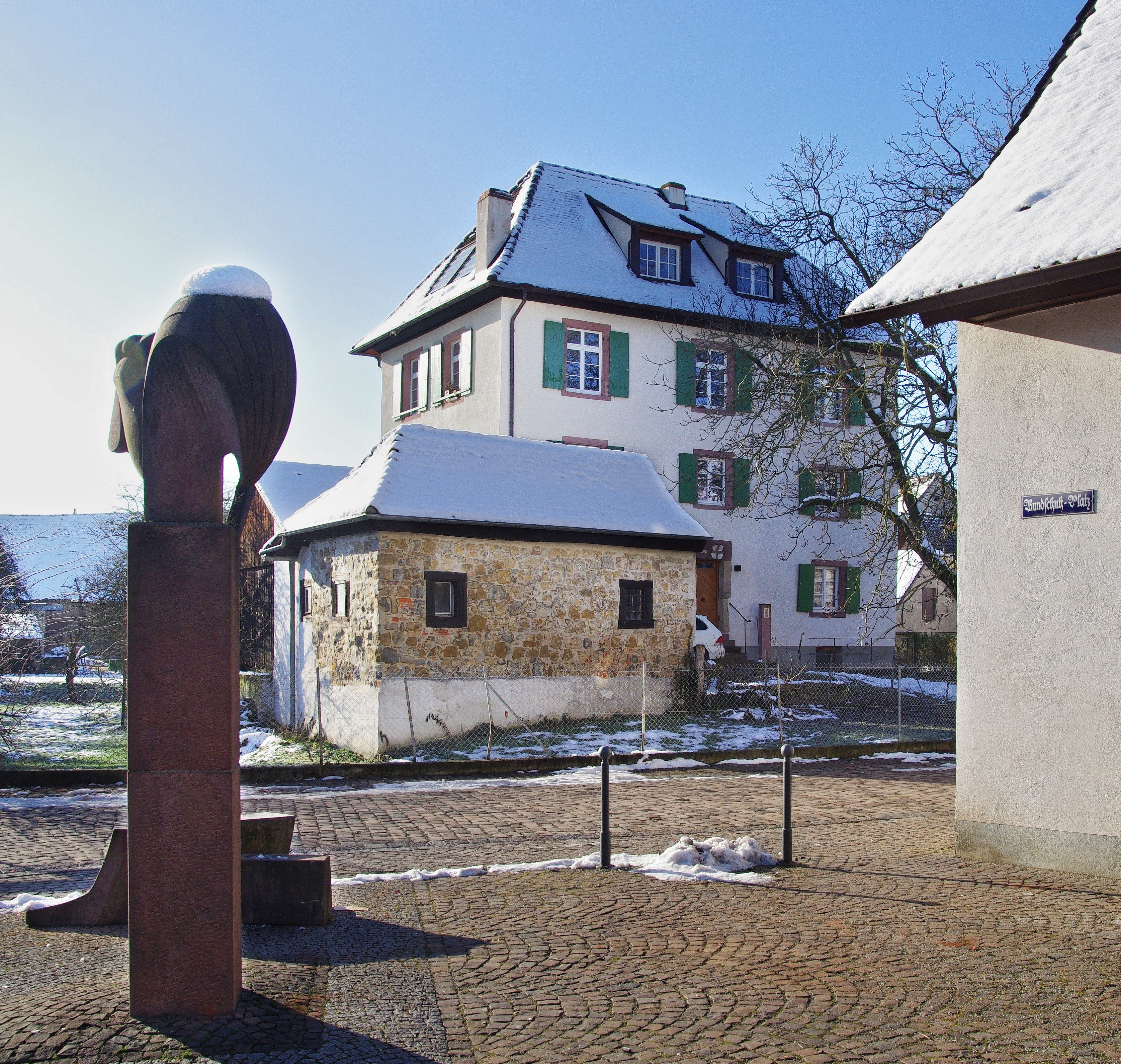 Weiherschlößchen.